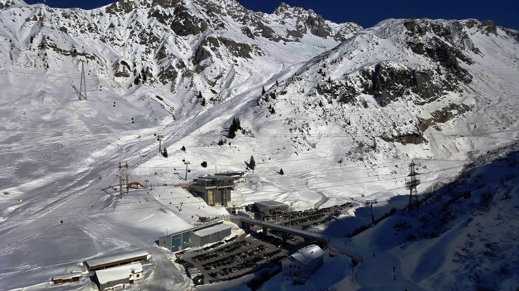 Die Talstationen der Flexenbahn, Albonabahn 2 und Valfagehrbahn auf der Alpe Rauz in Stuben am Arlberg